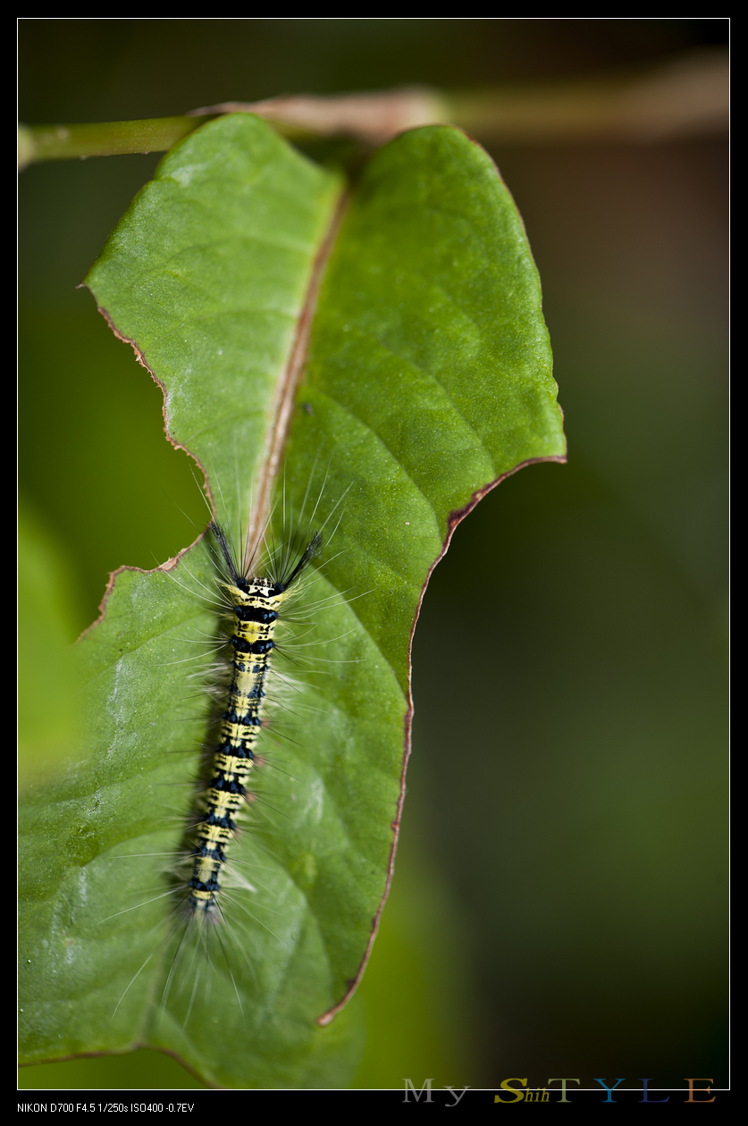 _DSJ4023 Trabala vishnou lefebure